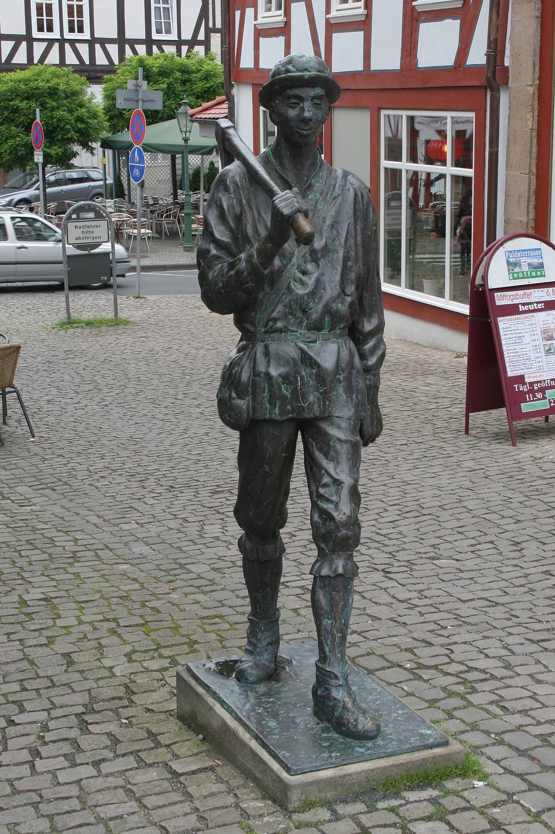 Bartenwetzer-Skulptur auf der Bartenwetzerbrücke in Melsungen.